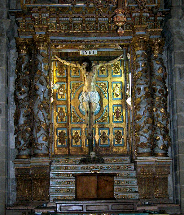 Capilla del Santísimo Cristo de Burgos de la catedral de Santiago de Compostela